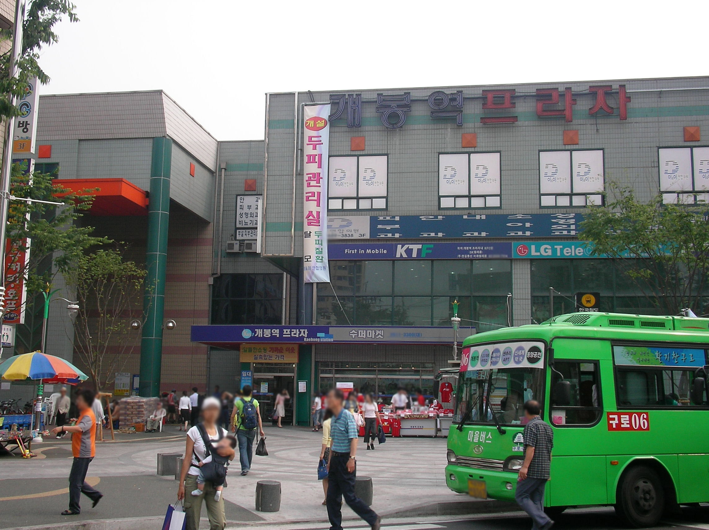 Gaebong Station (ko en ia io ja)